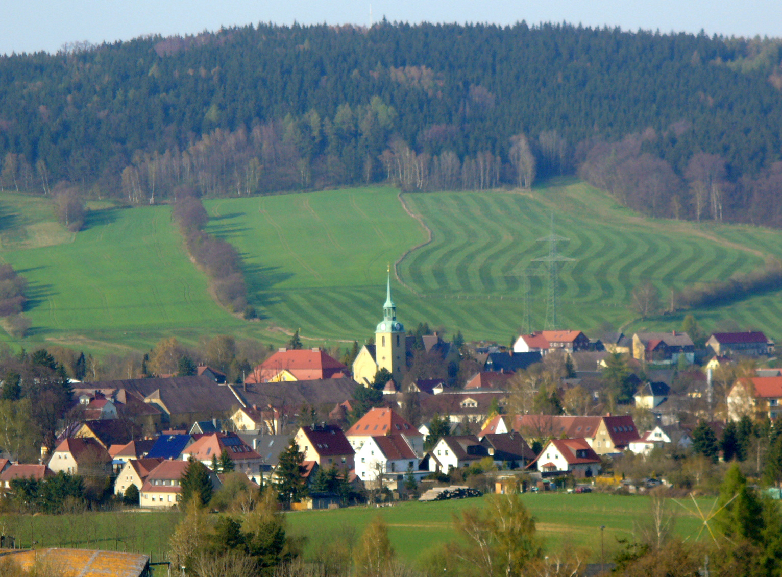 panoramo de Wilthen en Germanio